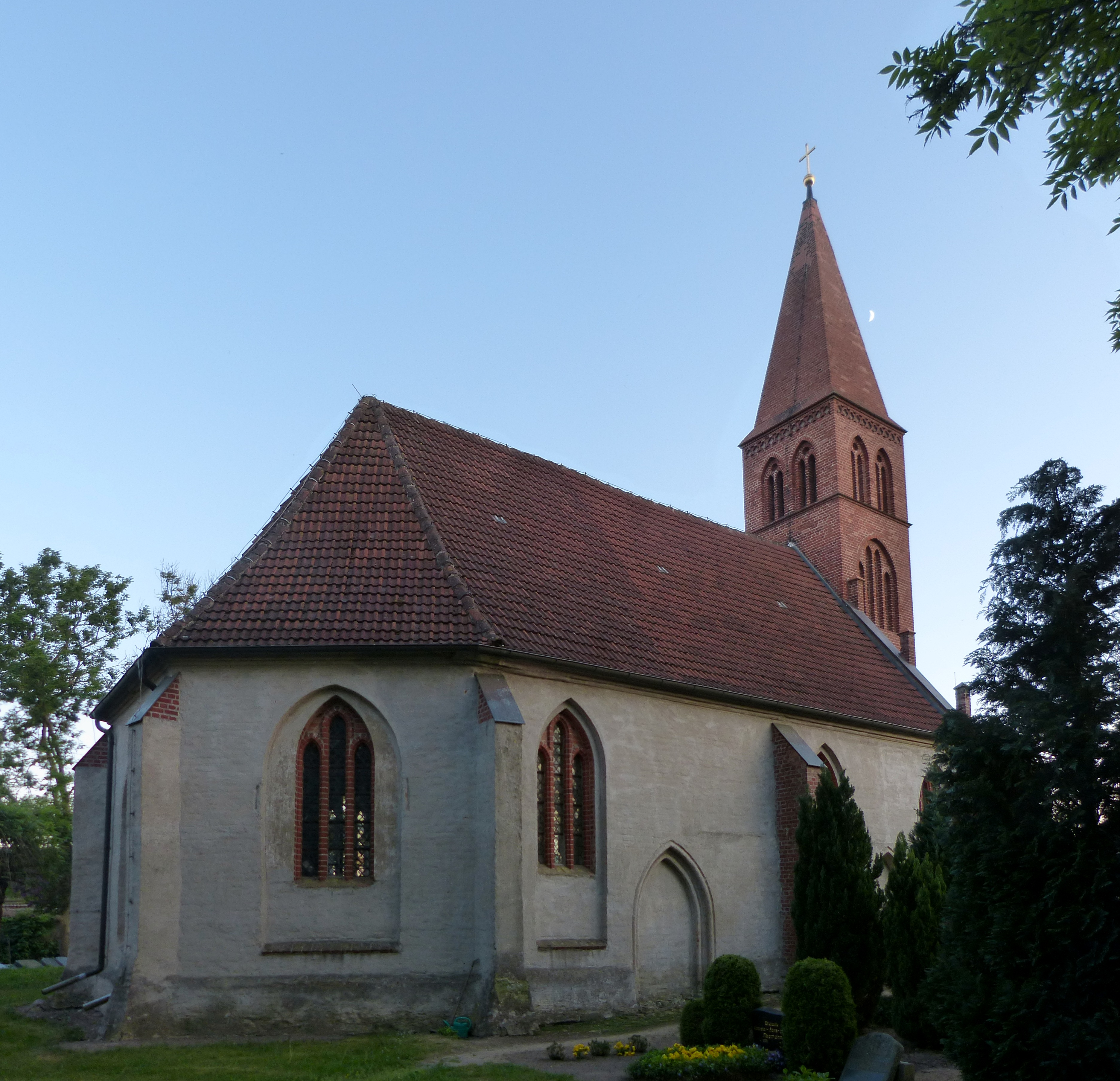 Kirche in Görke, Gemeinde Postlow